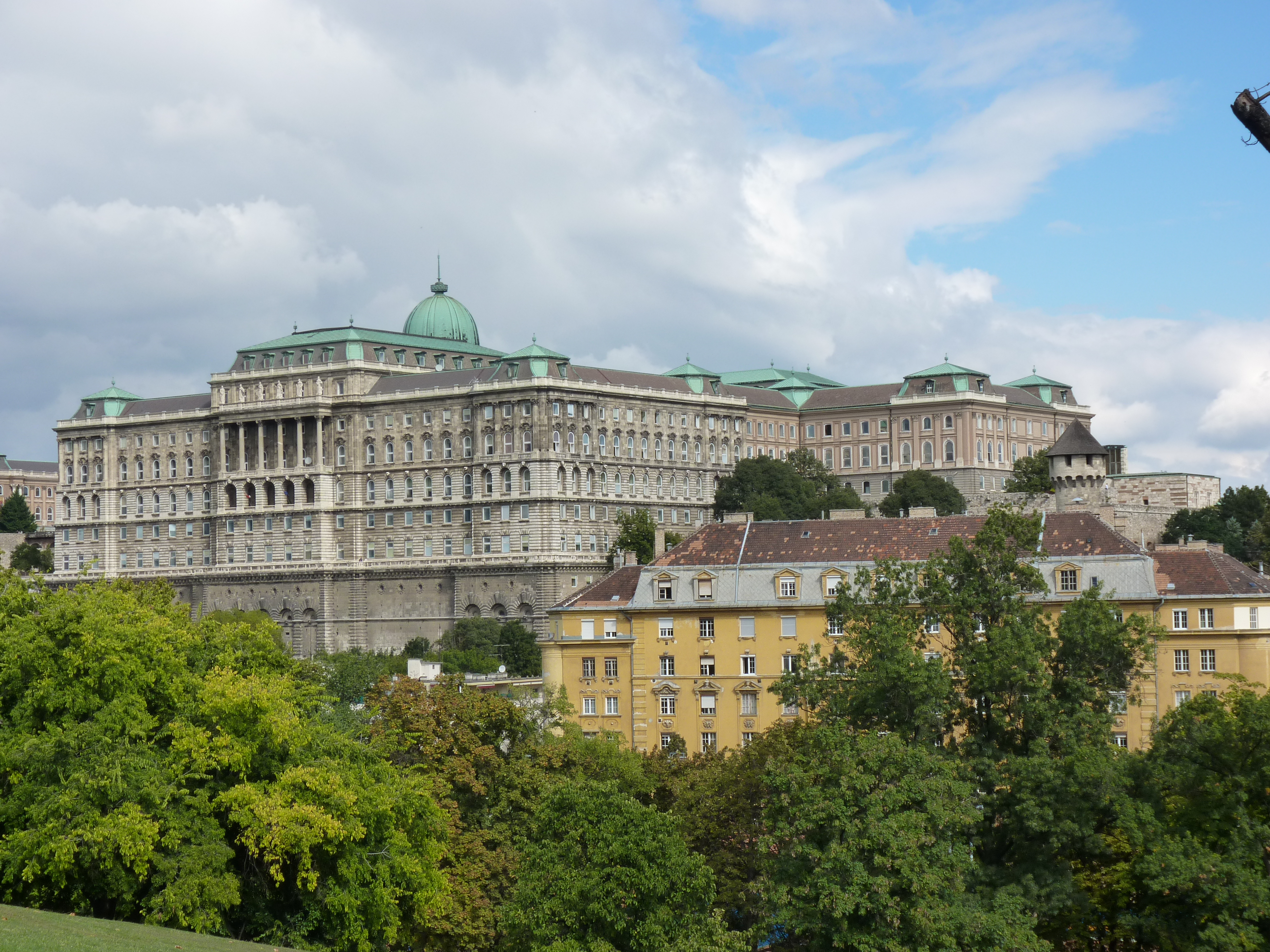 Budavári Palota (A, B, C, D, E, F épület) This is a photo of a monument in Hungary. Identifier: 138